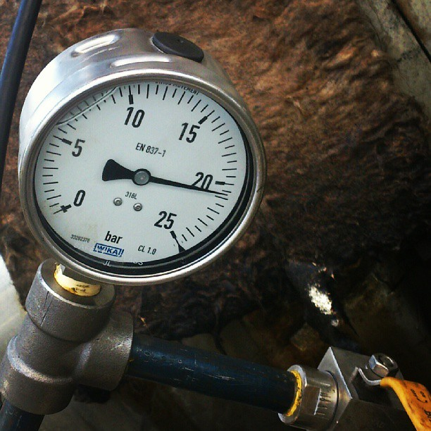 کوردی: pressure gauge